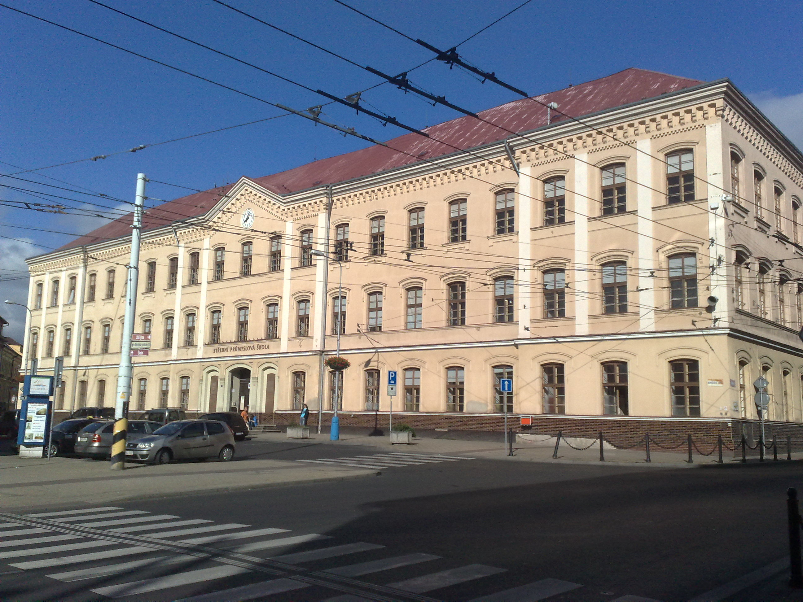 Česky: Střední průmyslová škola Teplice